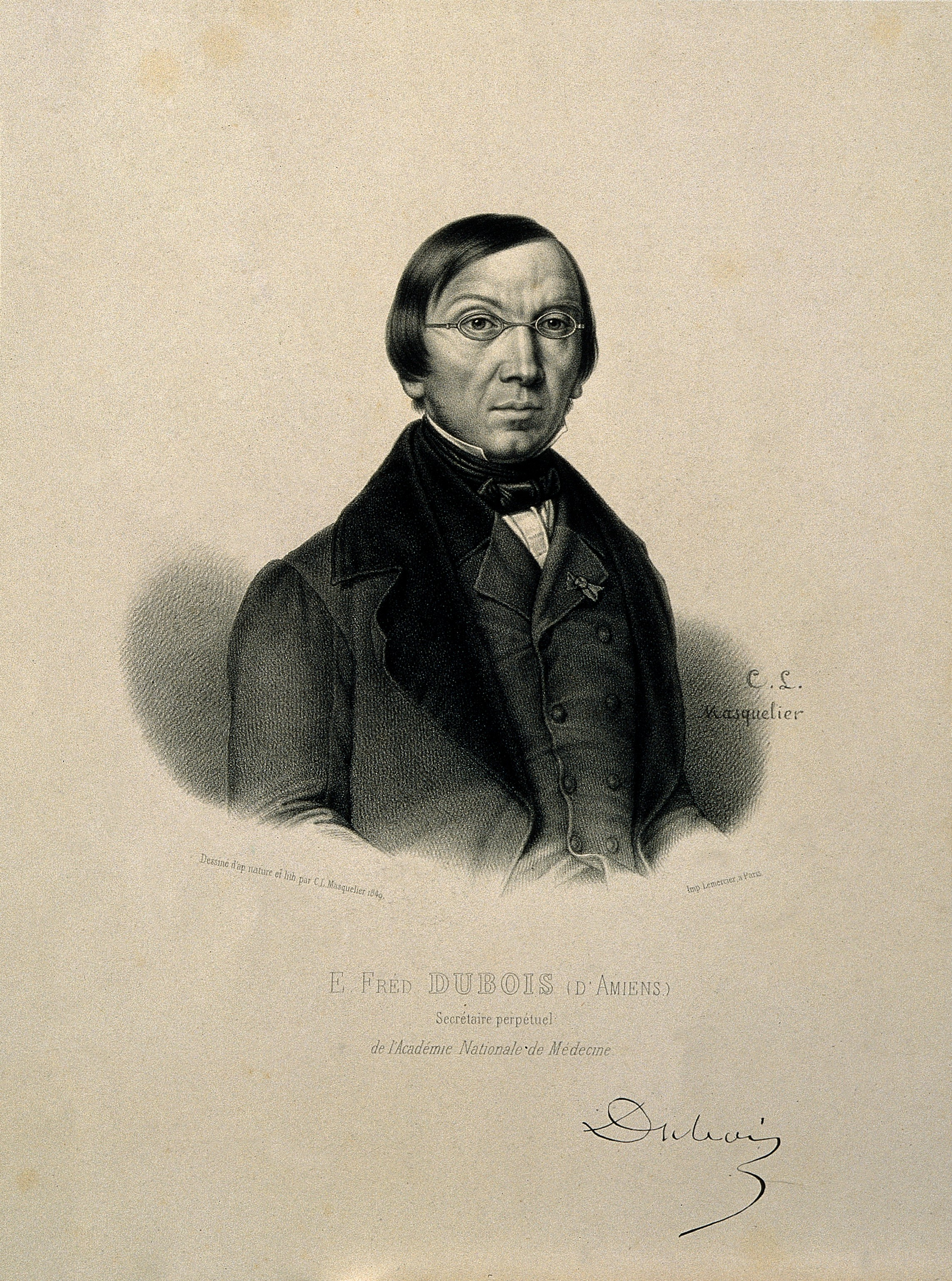 Topic-LCSH: Eyeglasses. Genre/Technique: Portrait prints. Lithographs. Subject name: Dubois d'Amiens, E. Frédéric, 1797-1873.